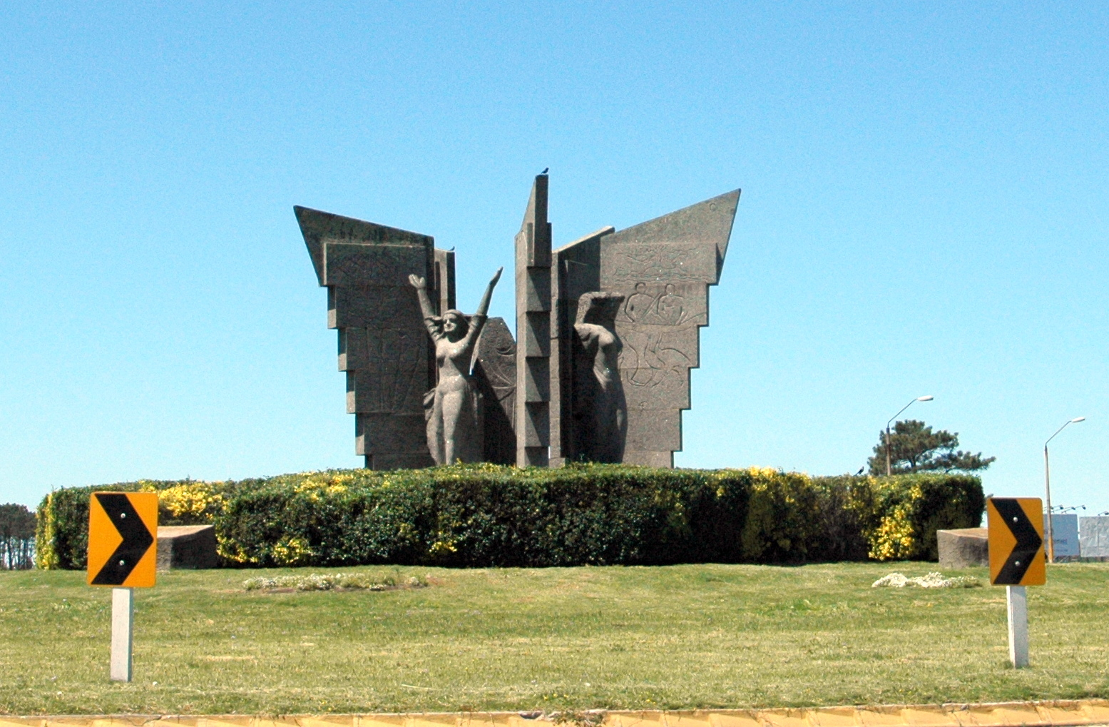 Rotonda Plaza